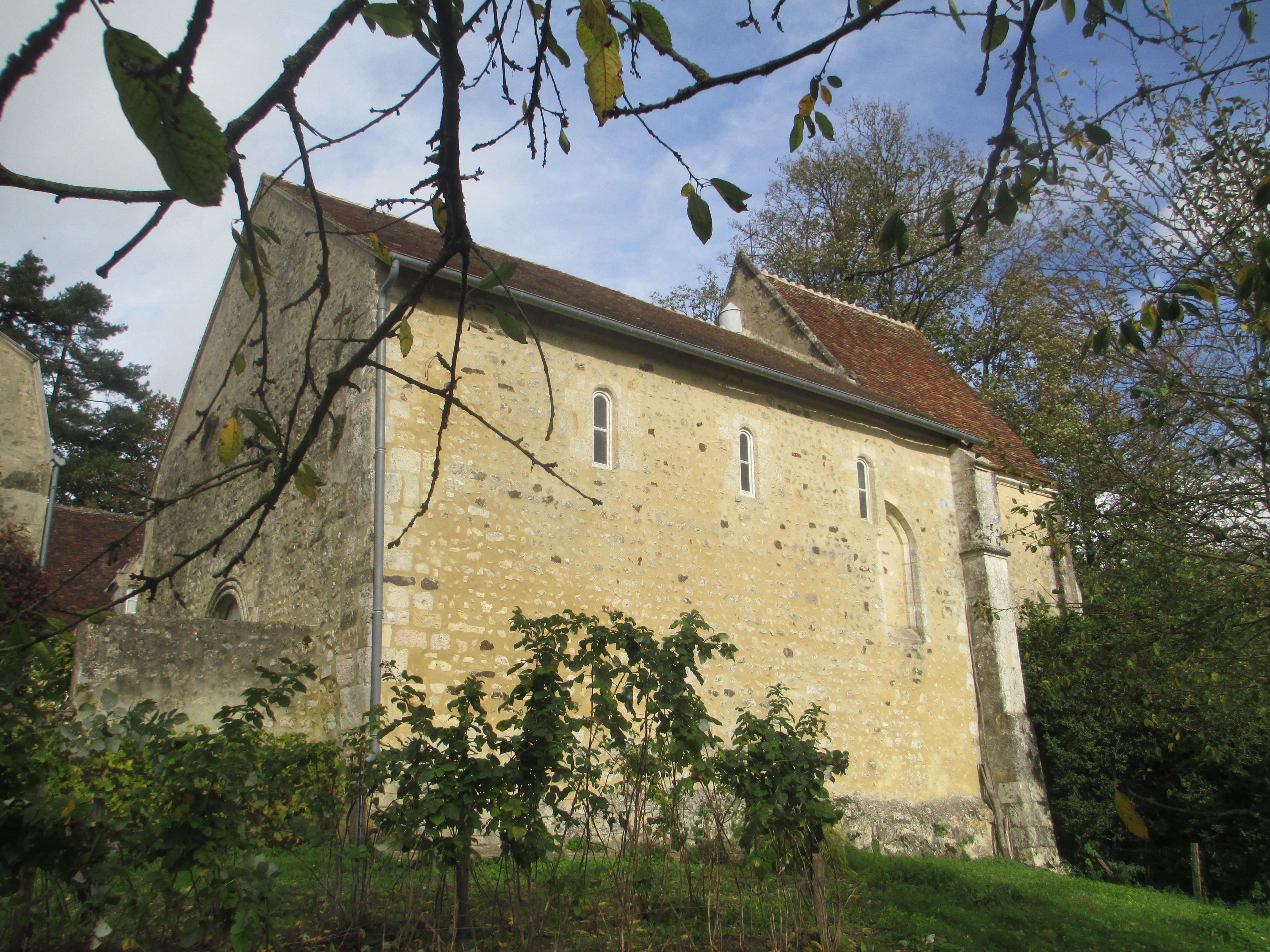 Chapelle Saint-Santin à Bellême, dans l'Orne.